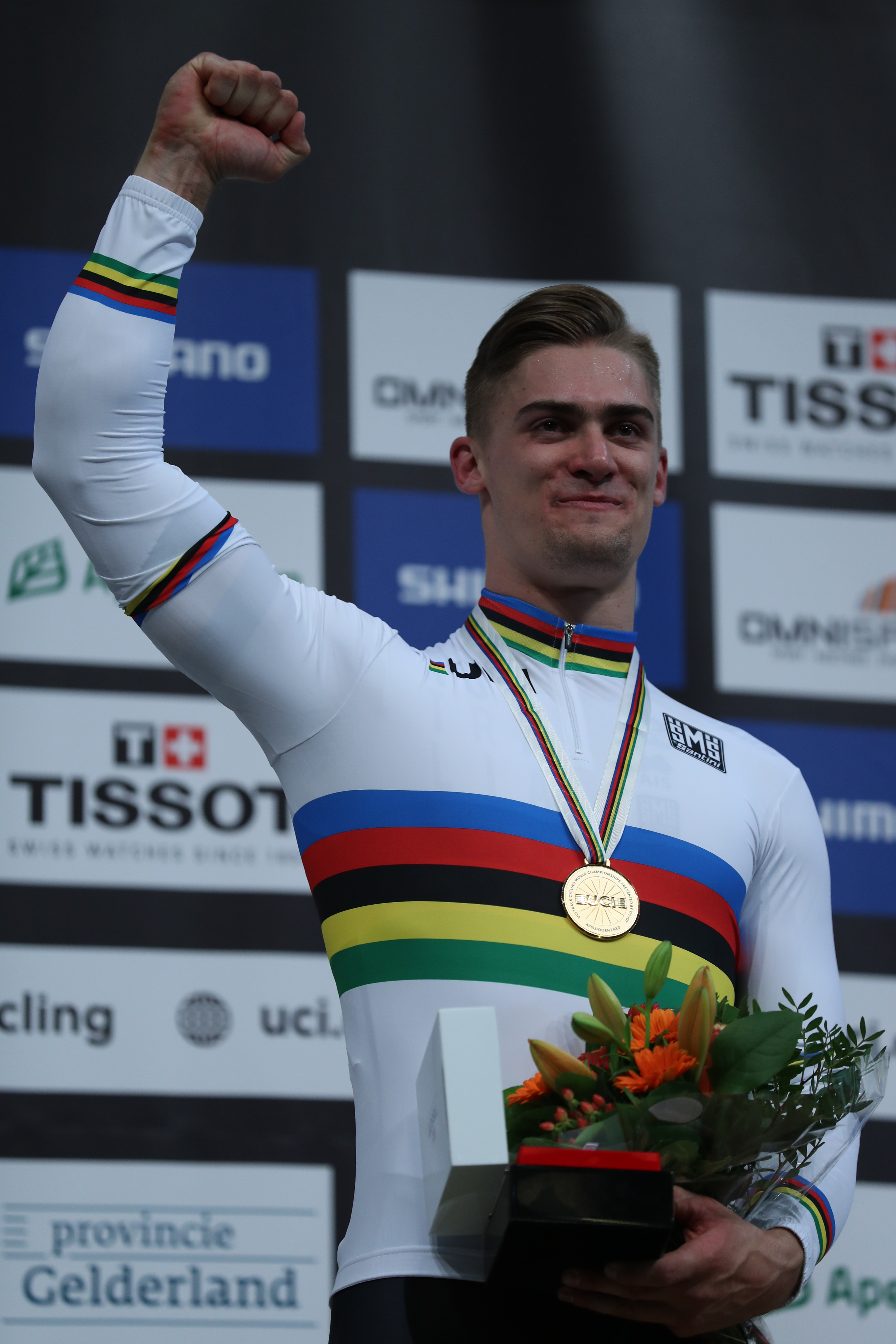 Matthew Glaetzer, australischer Radsportler - Weltmeister im Sprint